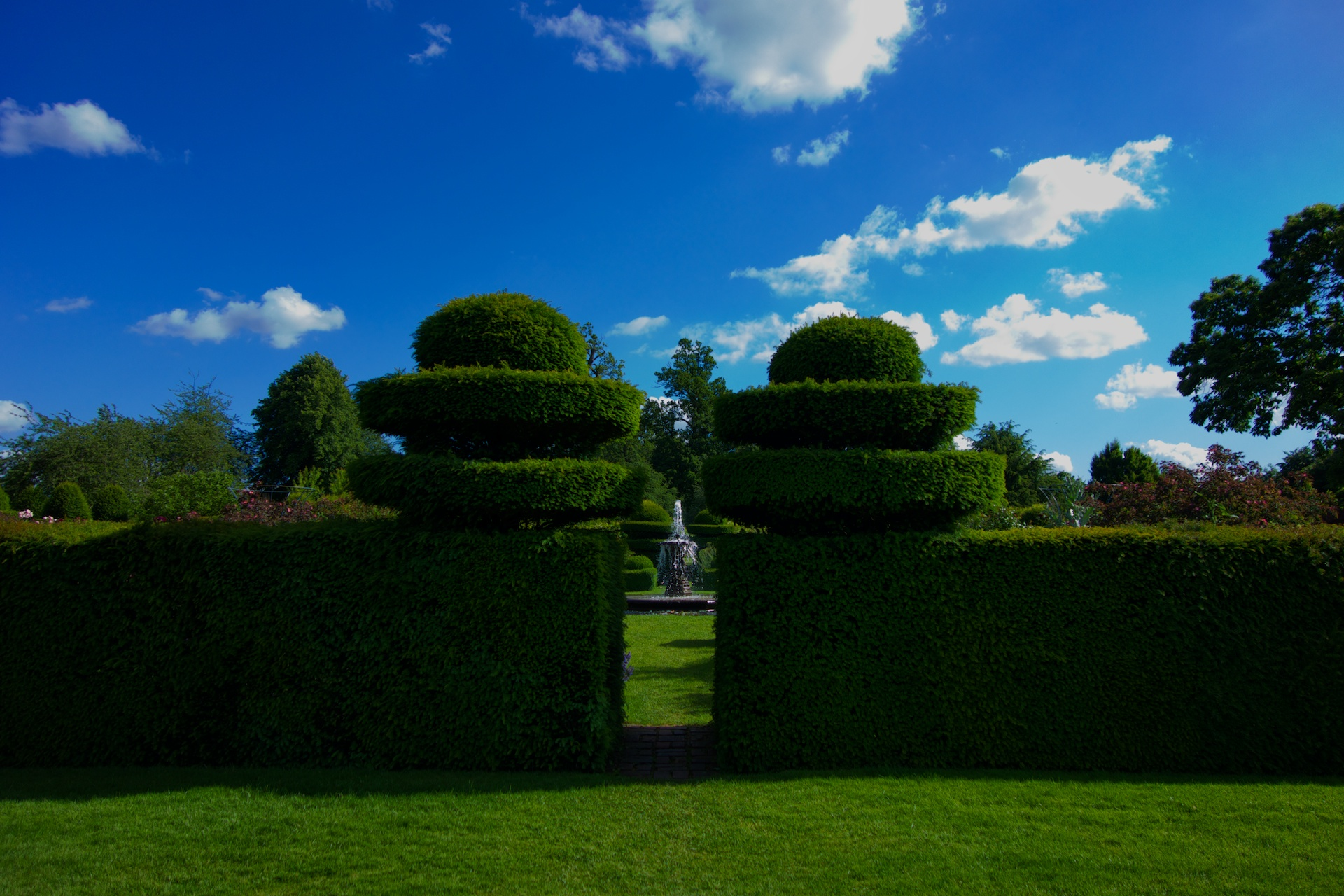 Hatfield House Gardens